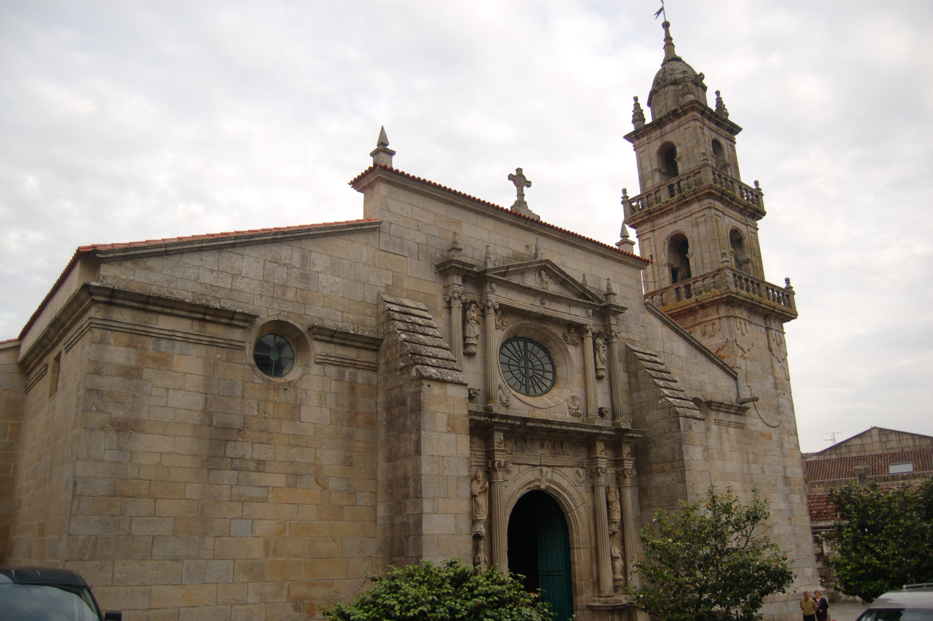 Colexiata de Santiago e San Salvador de Cangas